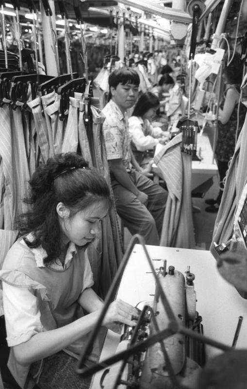 ADN-ZB/Sindermann/2.7.90/Rostock/Shanty/Am Band wird ihre fleißige Arbeit geschätzt. Trotzdem gehören 290 vietnamesische Näherinnen zu den ersten Arbeitskräften, die der Rostocker Jugendmodebetrieb "Shanty" entläßt und Ende August "im Einvernehmen mit ihrer Regierung" nach Hause schickt. Pham Thi Thu und ihr Betreuer Lai Hopsau (im Hintergrund) haben vier Jahre in der DDR gelebt und gearbeitet.